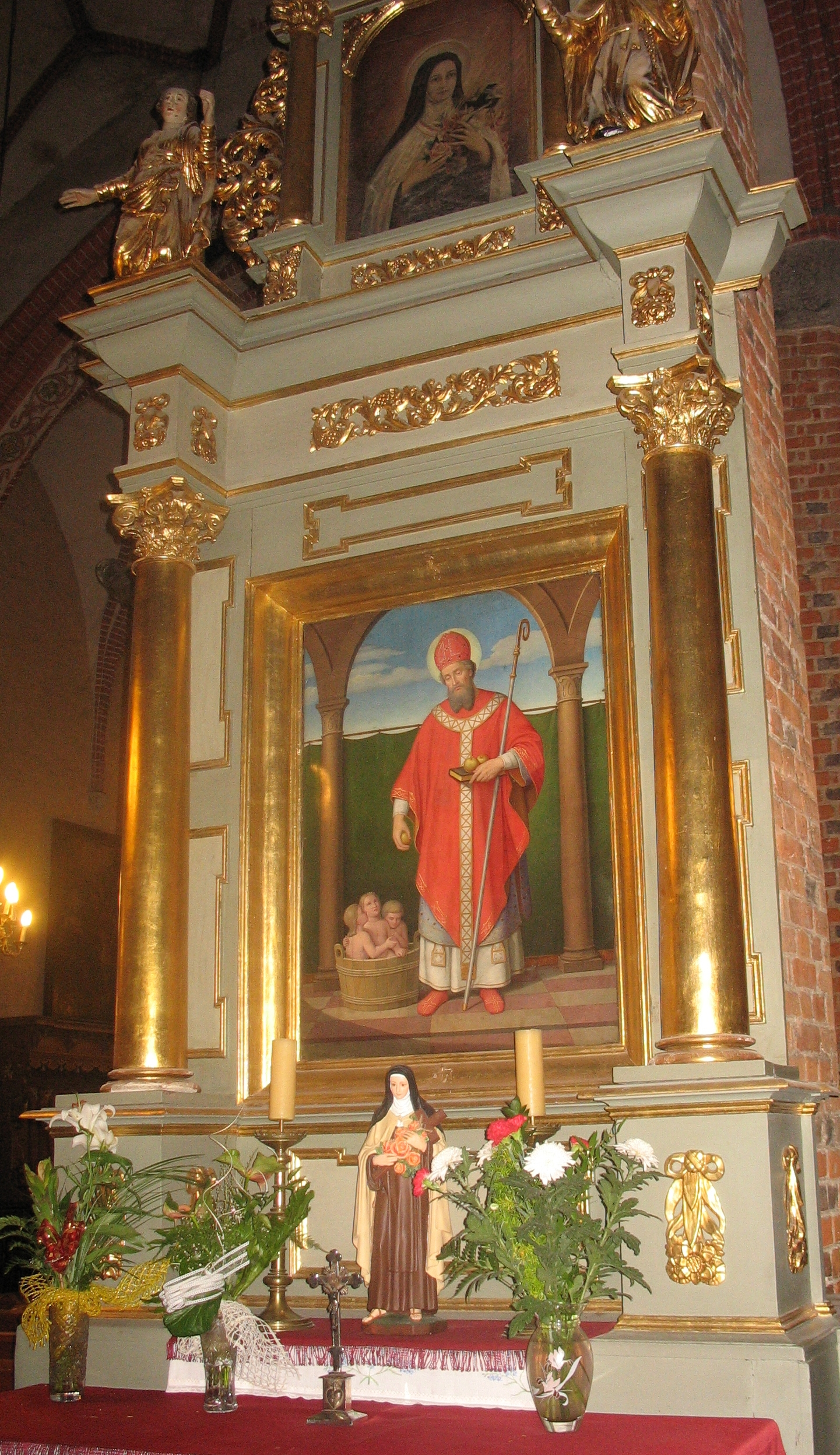 Ołtarz św. Mikołaja w Gniewie